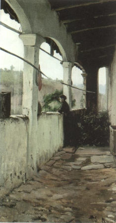 Catalan: Tarda de pluja, de Santiago Rusiñol- Biblioteca Museu Víctor Balaguertitle QS:P1476,ca:"Tarda de pluja, de Santiago Rusiñol- Biblioteca Museu Víctor Balaguer" label QS:Lca,"Tarda de pluja, de Santiago Rusiñol- Biblioteca Museu Víctor Balaguer"